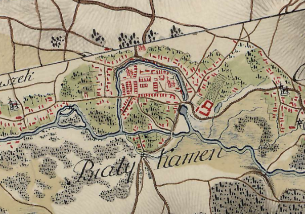 18ст.